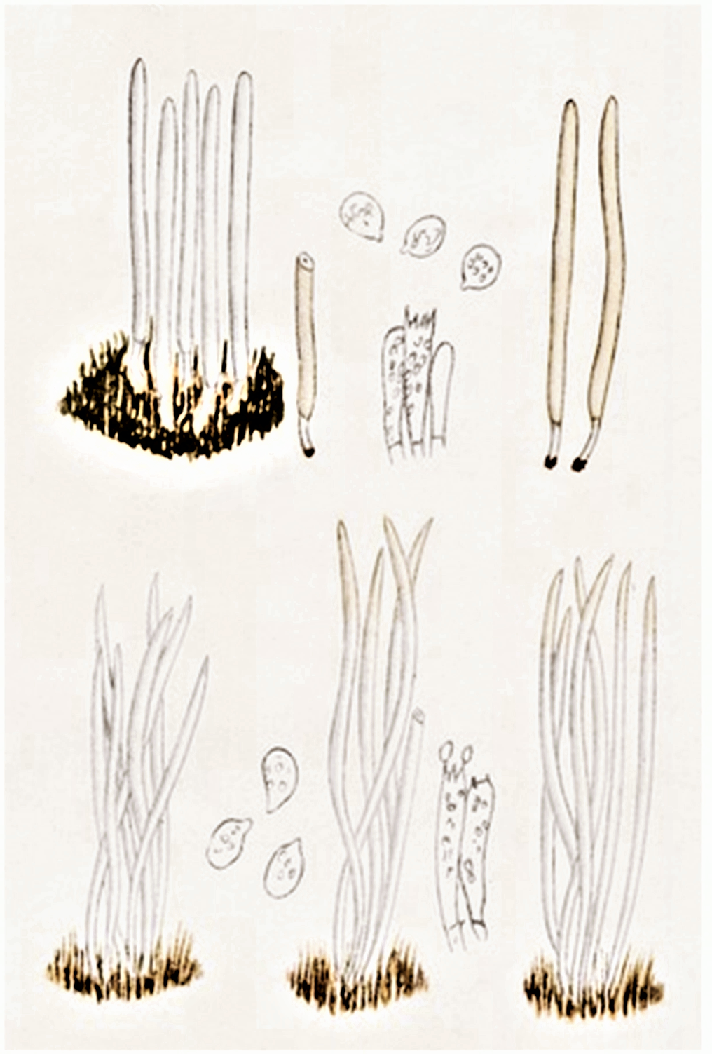 Bres.: Clavaria fragilis Holmsk. (1790)